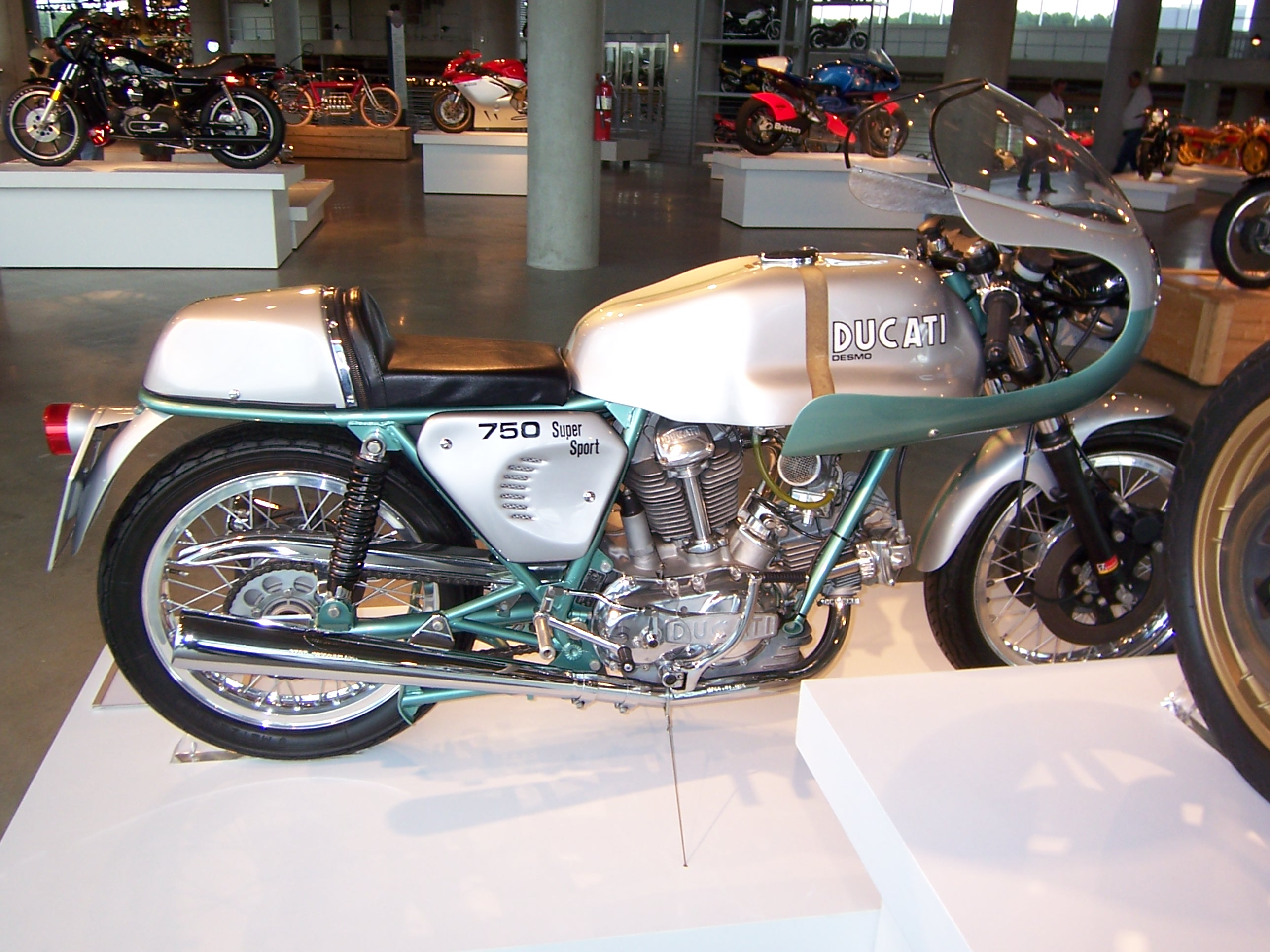 Ducati 750 SuperSport (or SS) 1ª serie del 1973